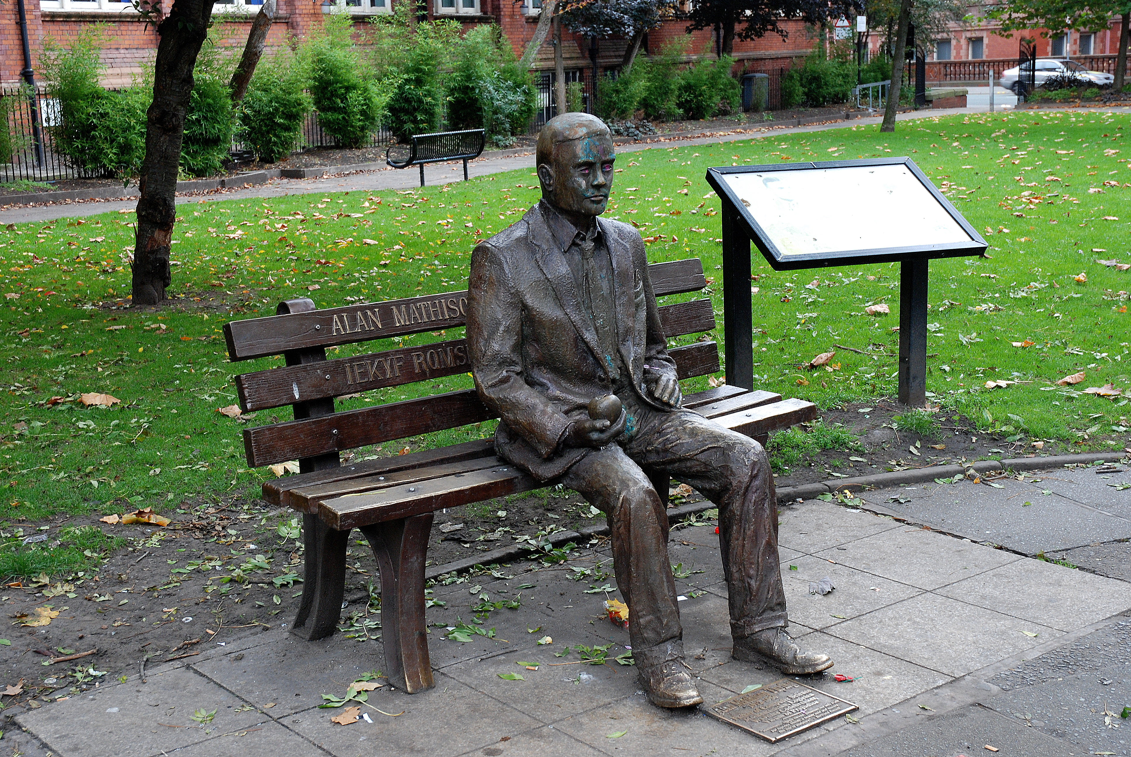 Beeld van Alan Turing in Sacksville Gardens, Manchester, Verenigd Koninkrijk